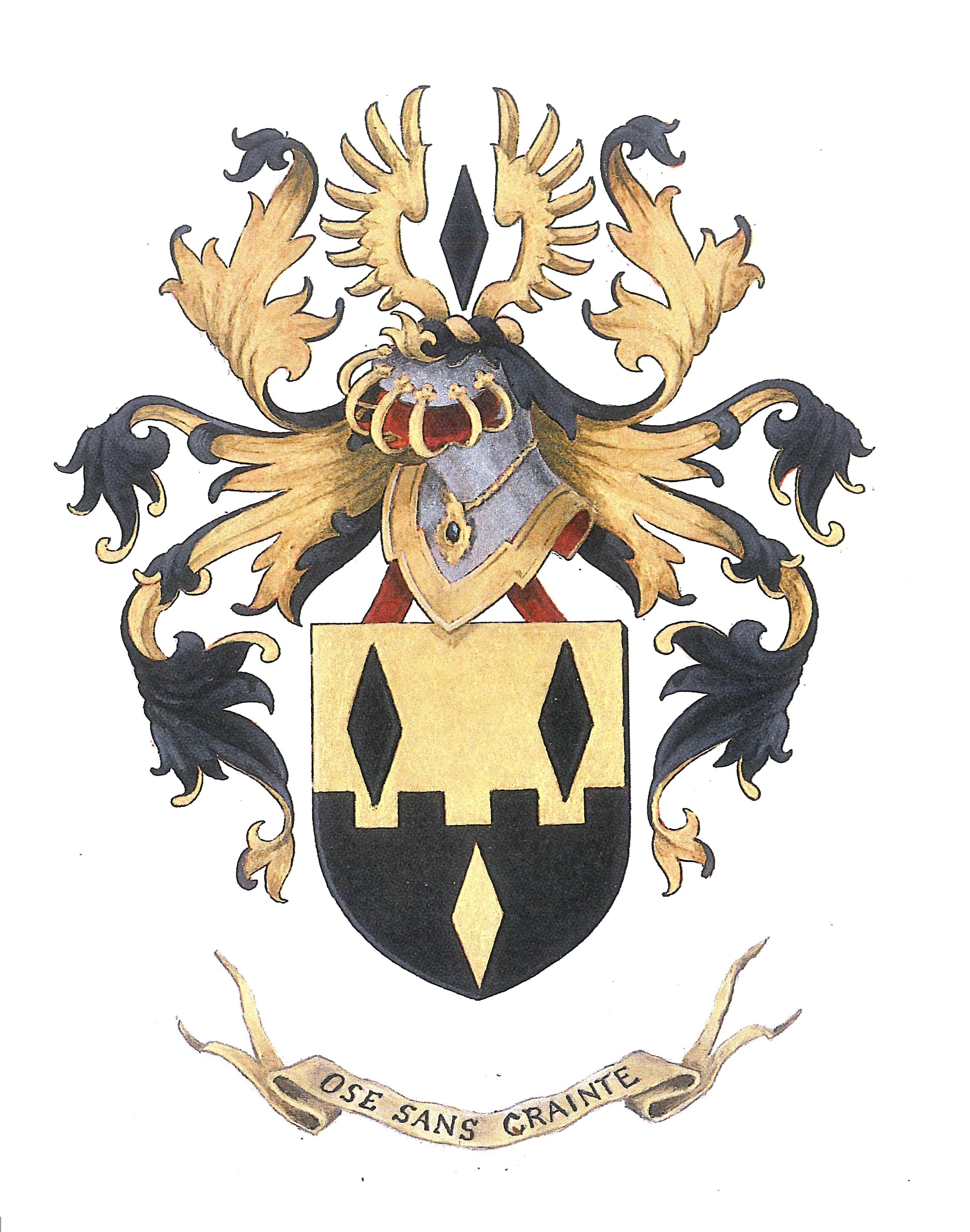 Famille d'Hose